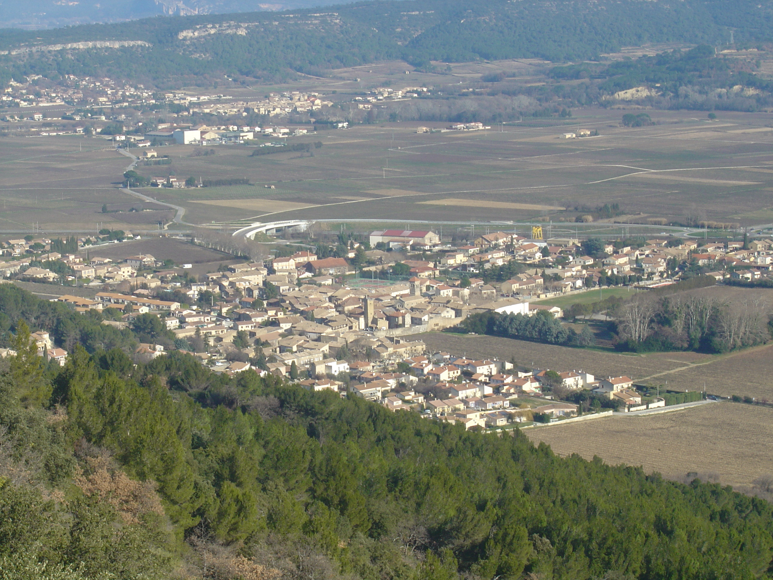 Orsan vu depuis le Camp de César